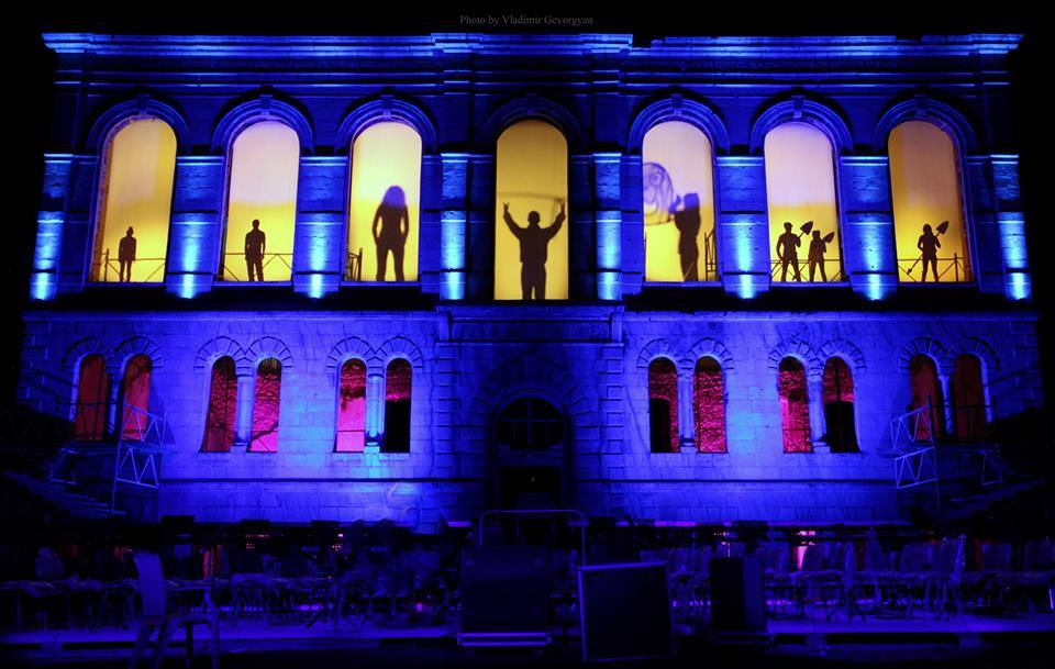 Ռեալական ուսումնարան